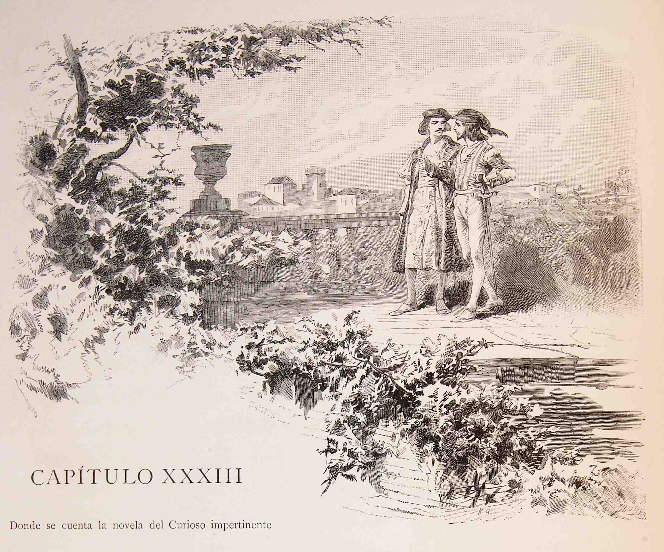 202_084_quijote_cap33